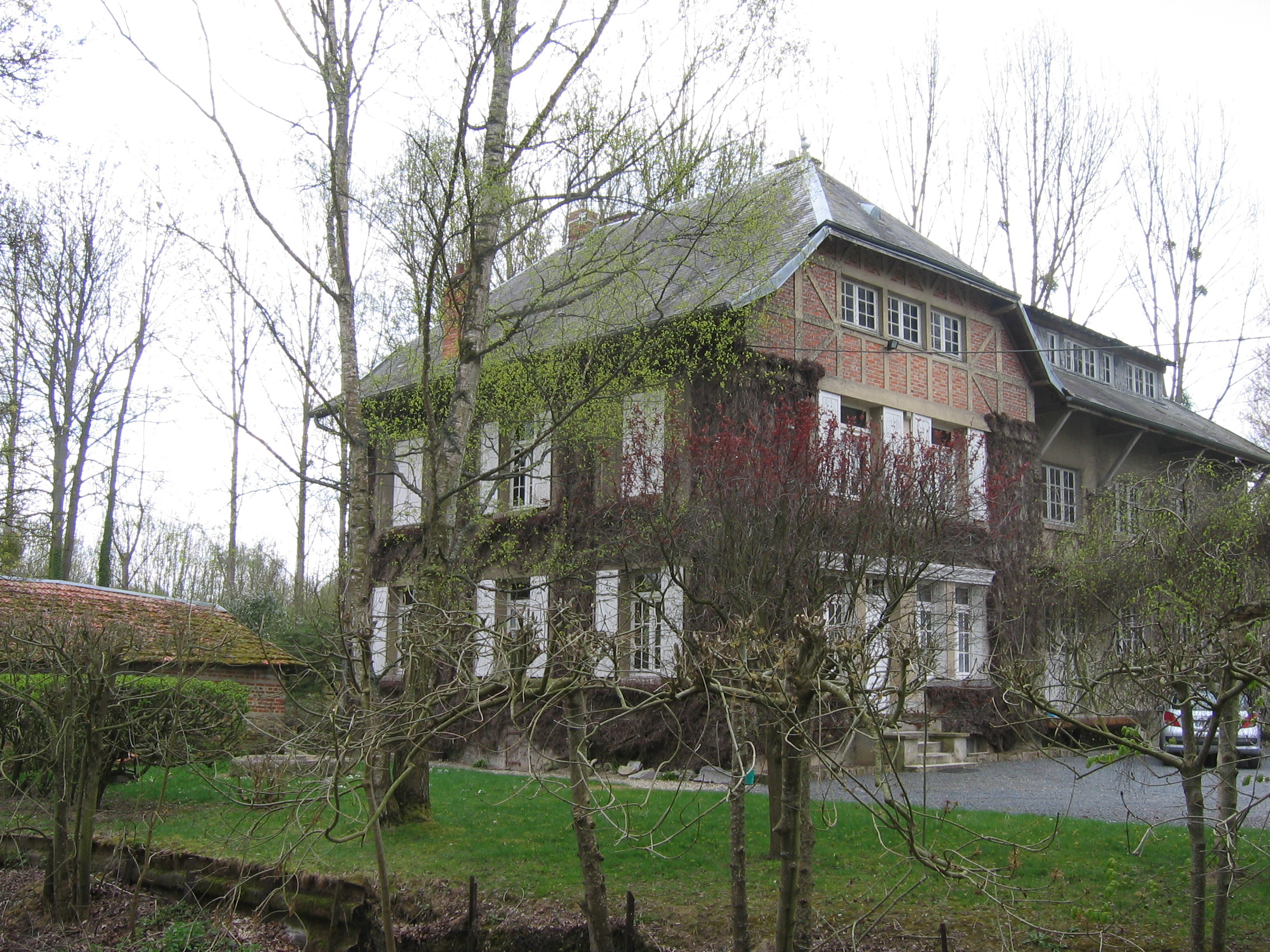 Moulin de St-Germainmont Ardennes France